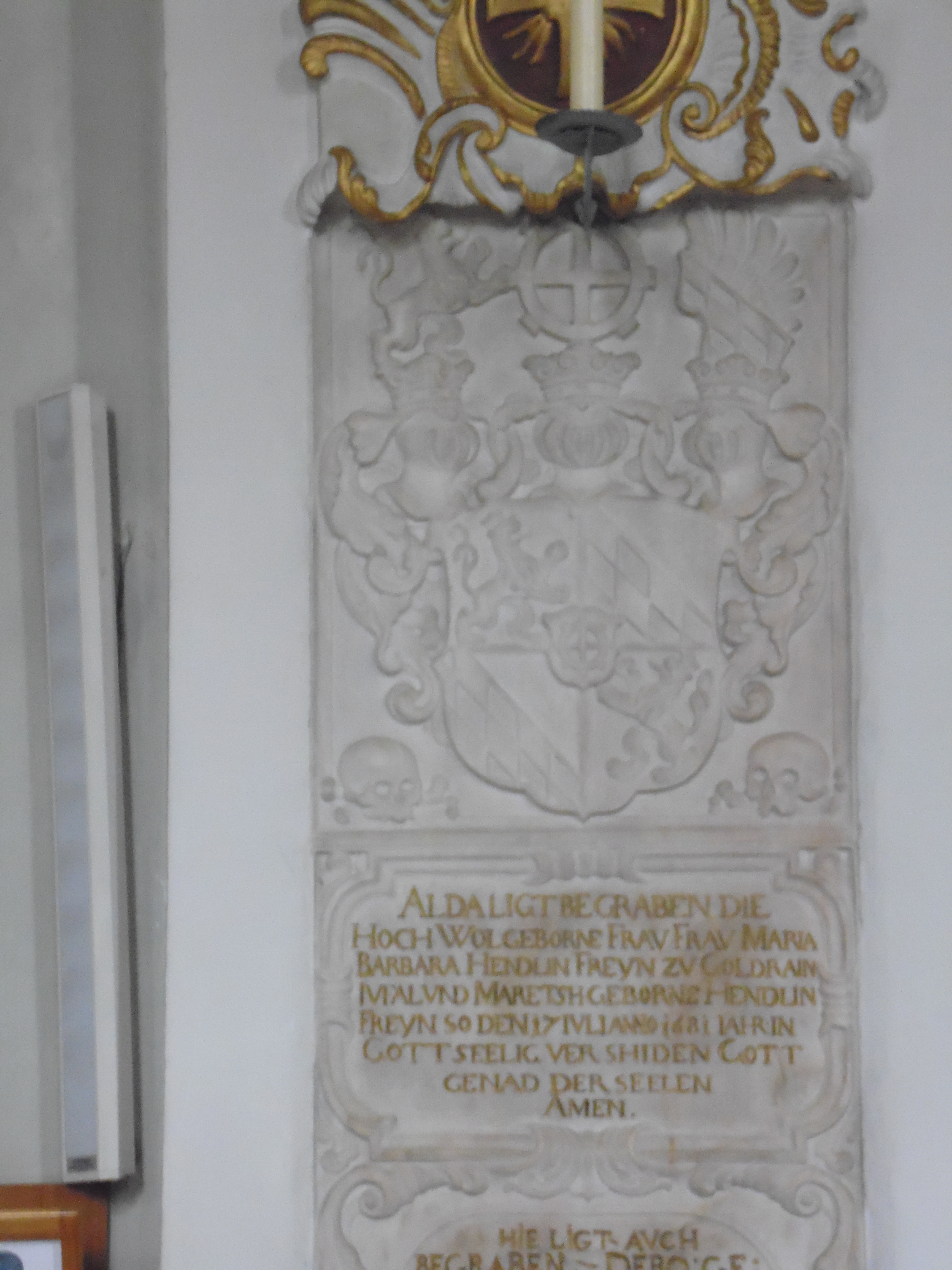 Grabplatte in der Pfarrkirche Maria Himmelfahrt (Schlanders)